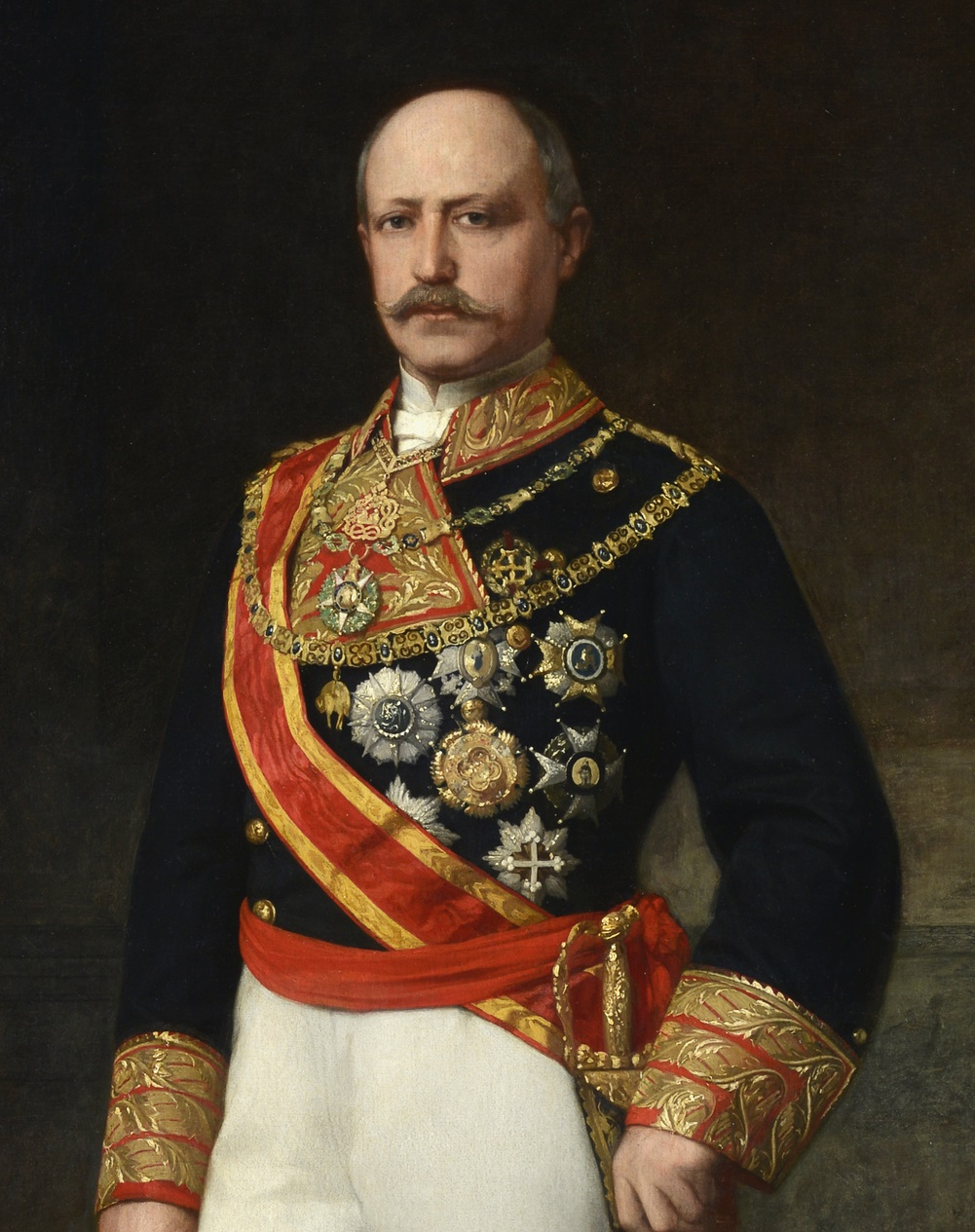 Retrato del general español Francisco Serrano y Domínguez (1810-1885), primer duque de la Torre y capitán general del ejército español.